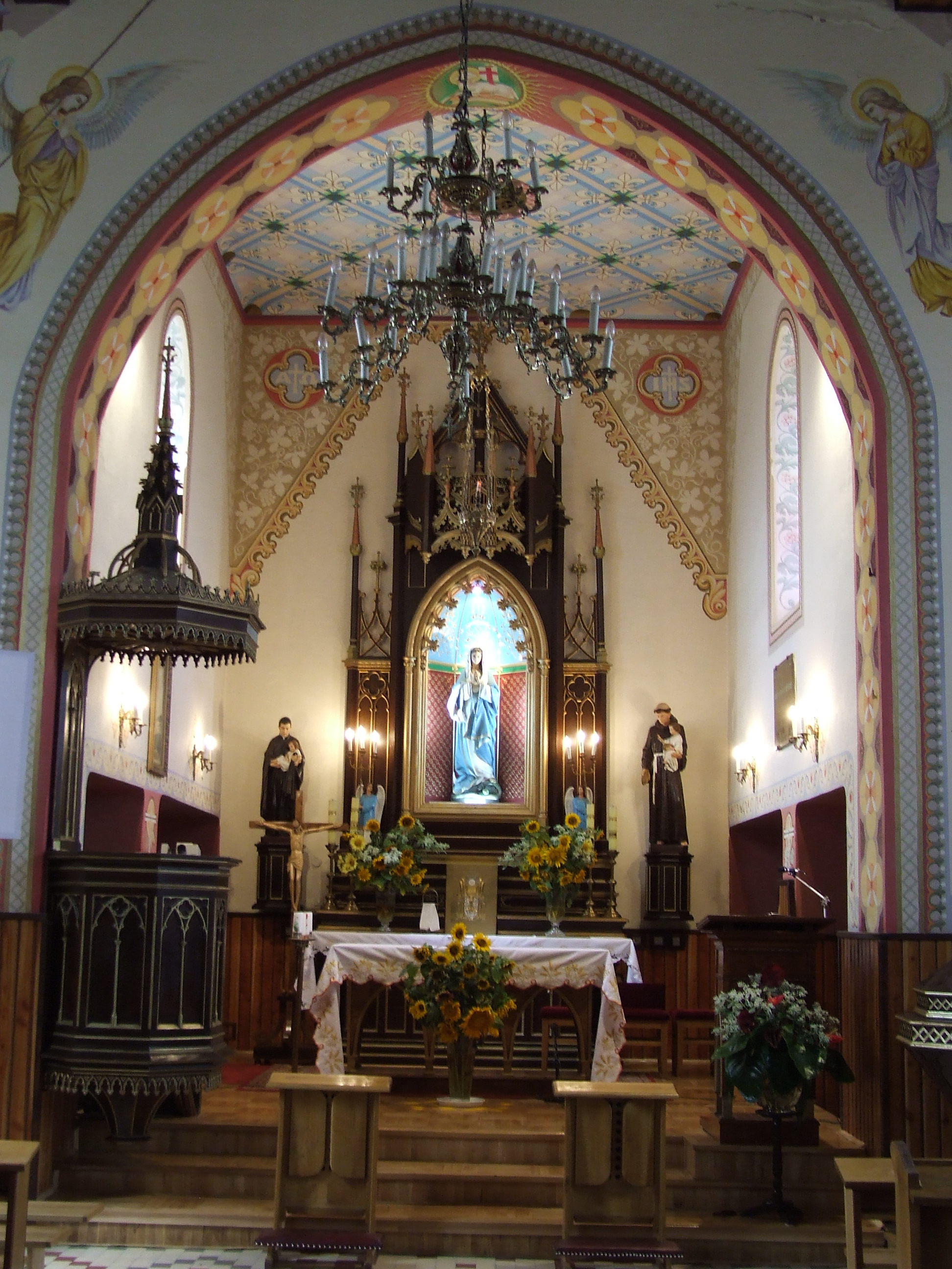 Szydłowo kościół